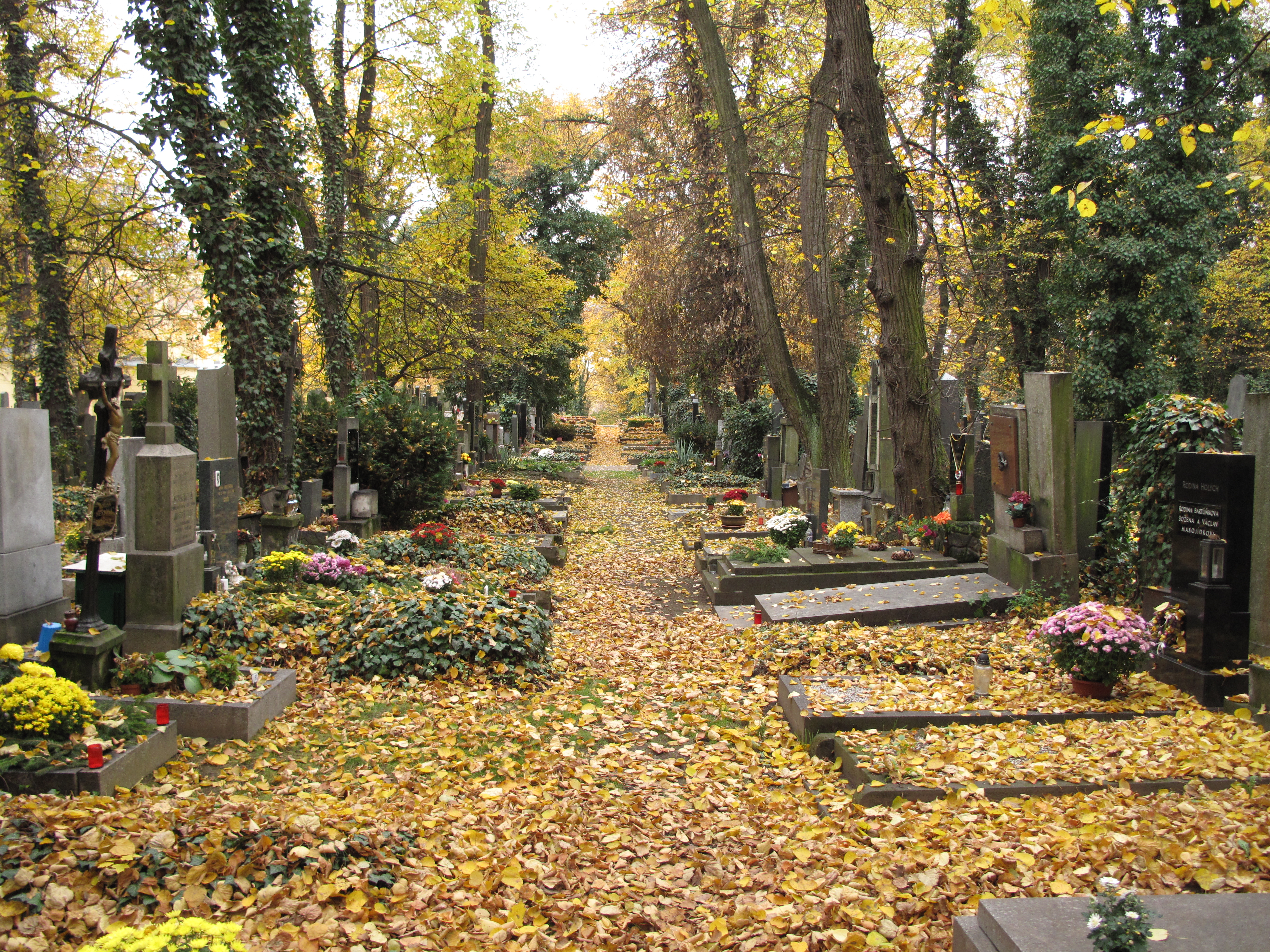 Hřbitov Malvazinky. Praha, Česká republika.